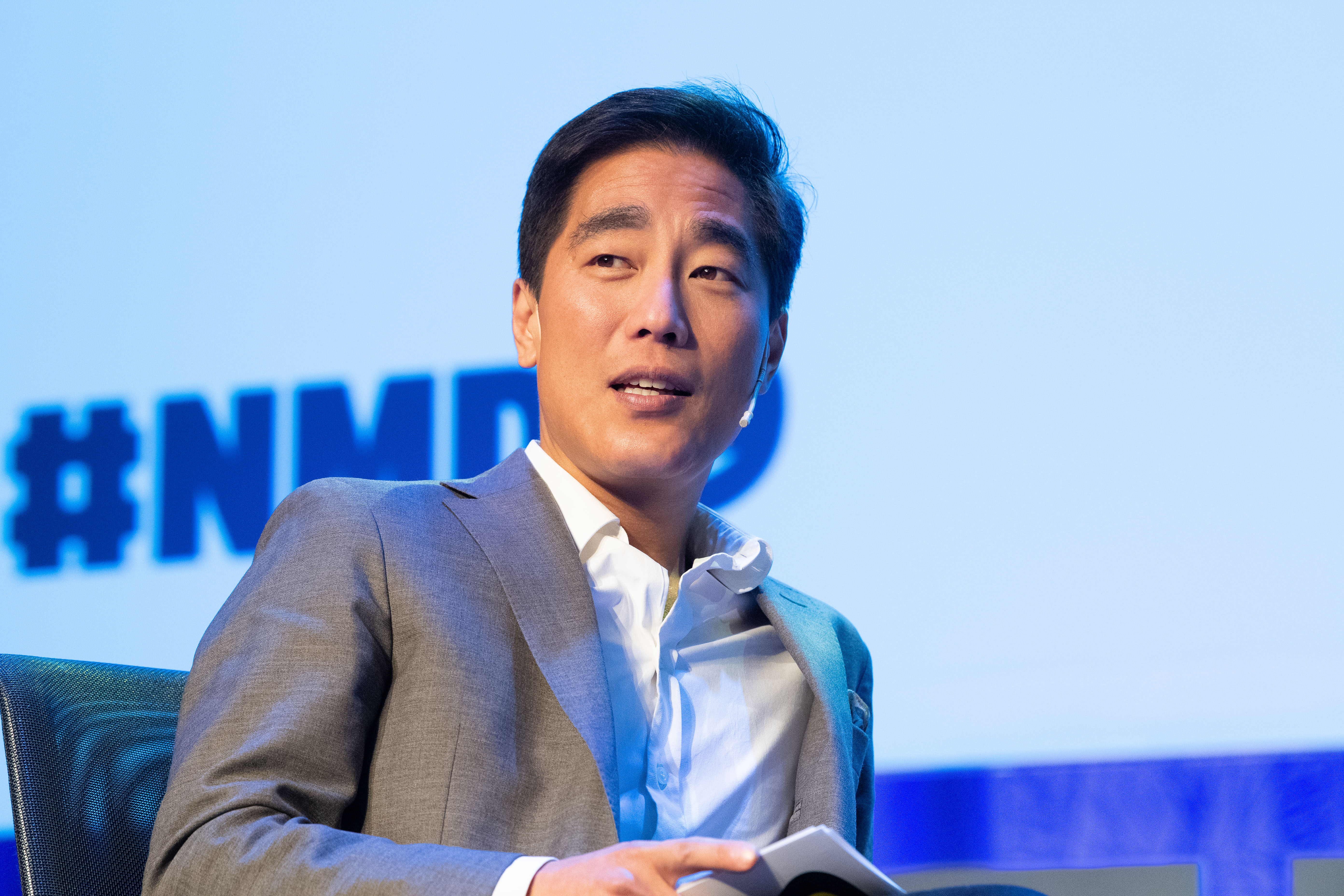 Aarebrotsamtalen